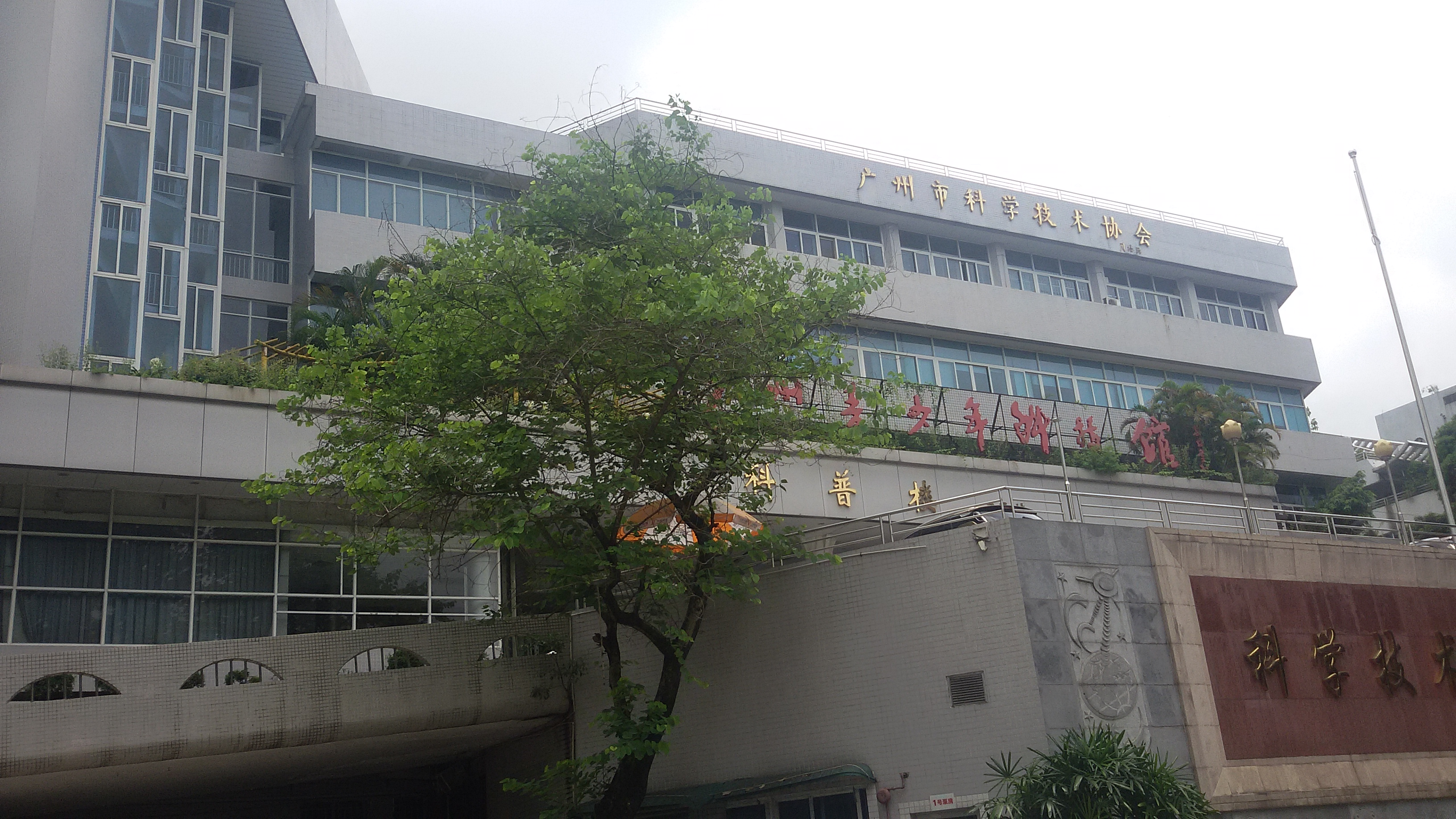 粵語: 廣州青少年科技館